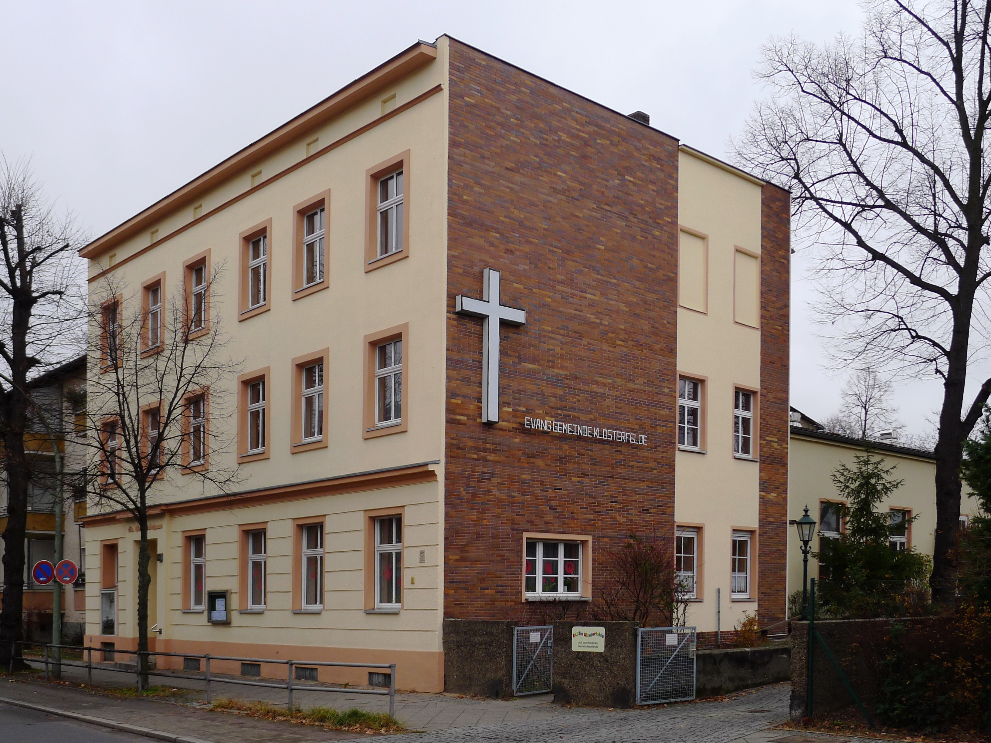 Vorderhaus mit Wohnungen und Gemeindebüro